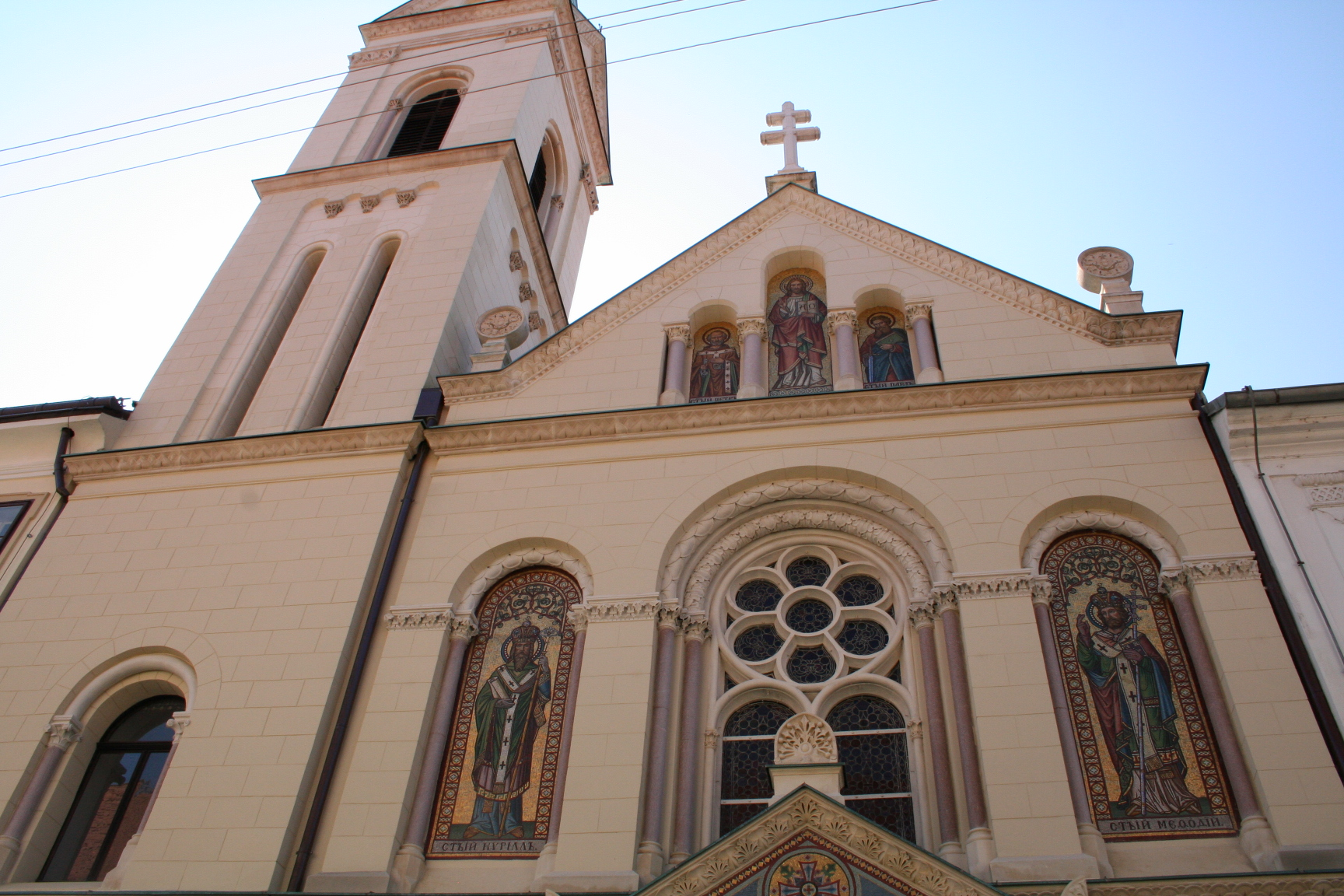 Crkva svetih Ćirila i Metoda u Zagrebu.